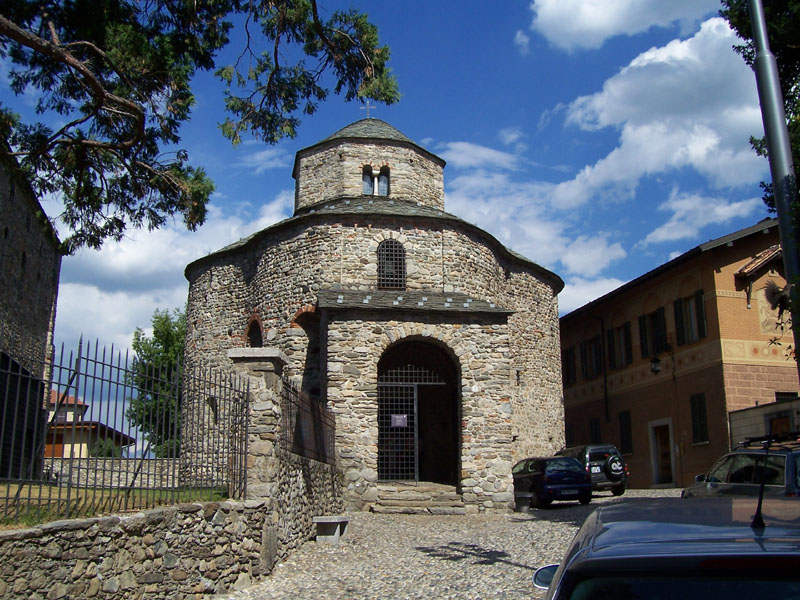 Galliano - Cantù Esterno del Battistero di San Giovanni in Galliano